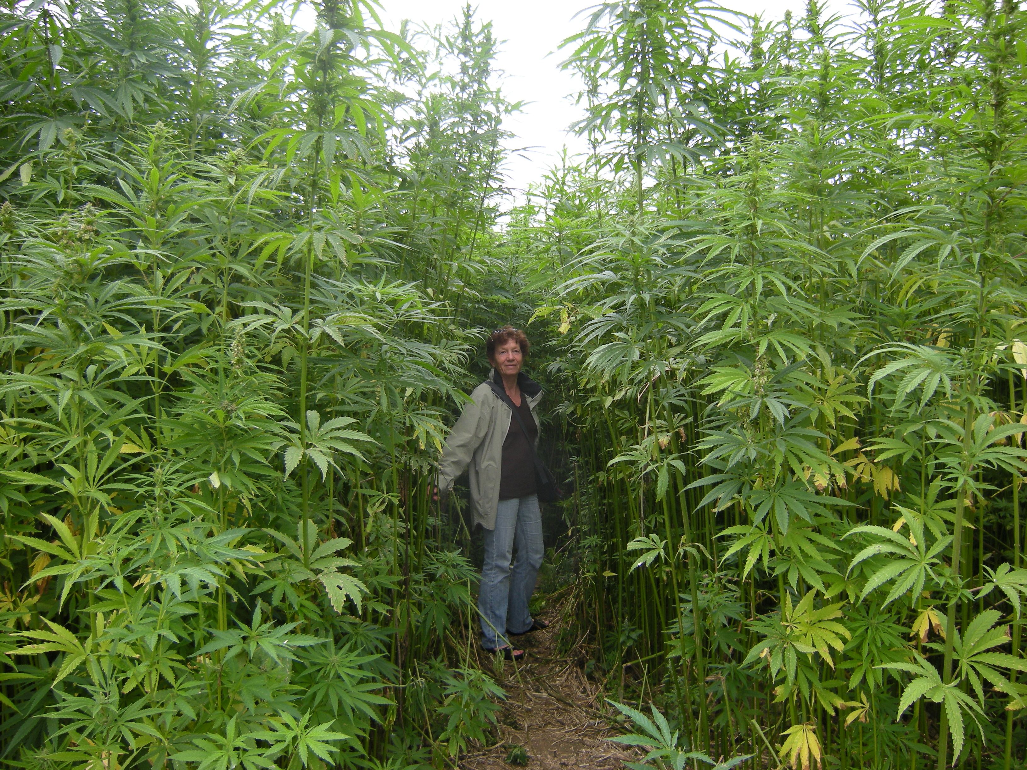 Ploëzal (Côtes-d'Armor, Bretagne, France) : Labyrinthe de chanvre au château de la Roche-Jagu.